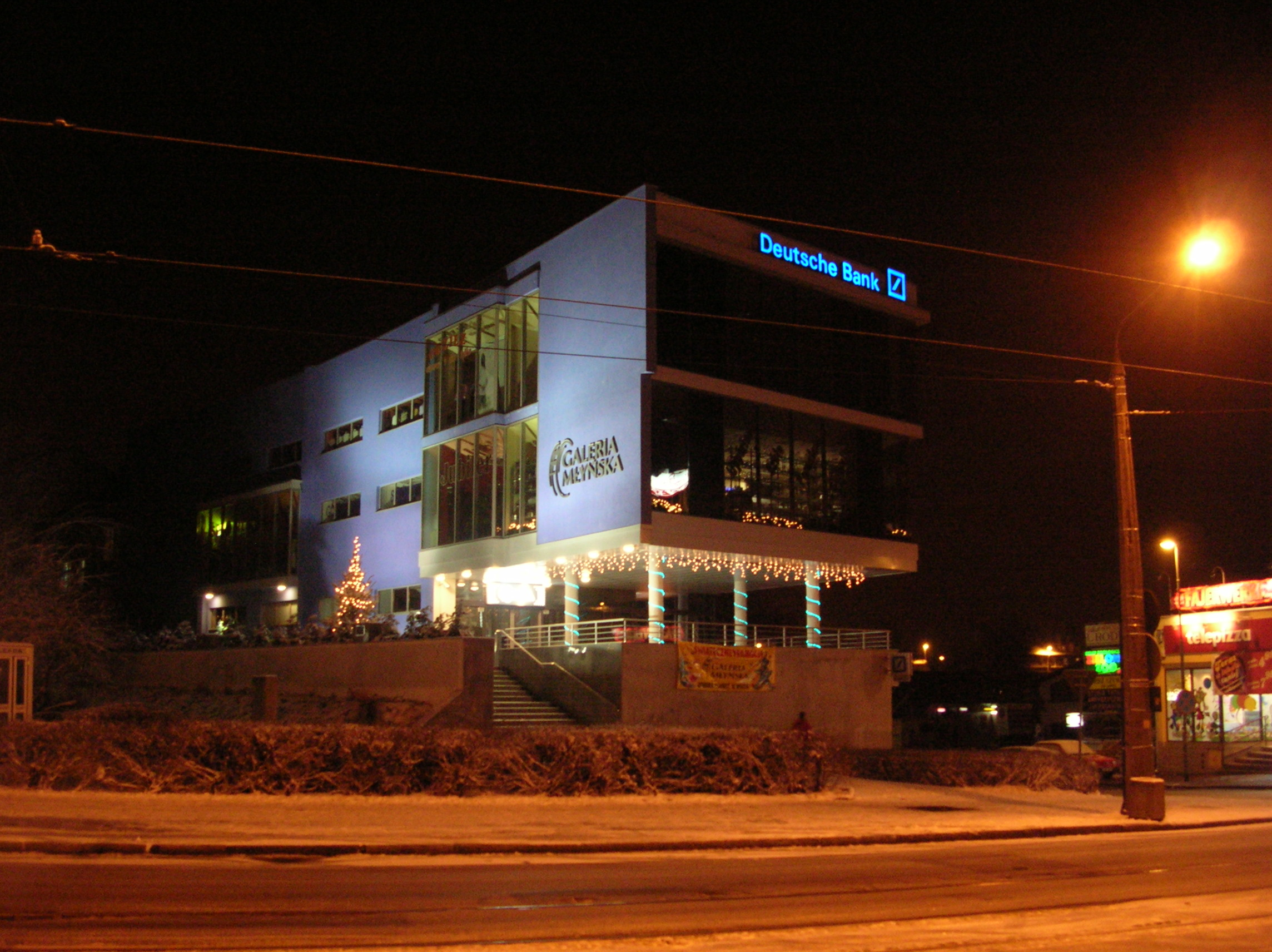 Gorzów - Galeria Młyńska nocą Autor : Bartek Wawraszko